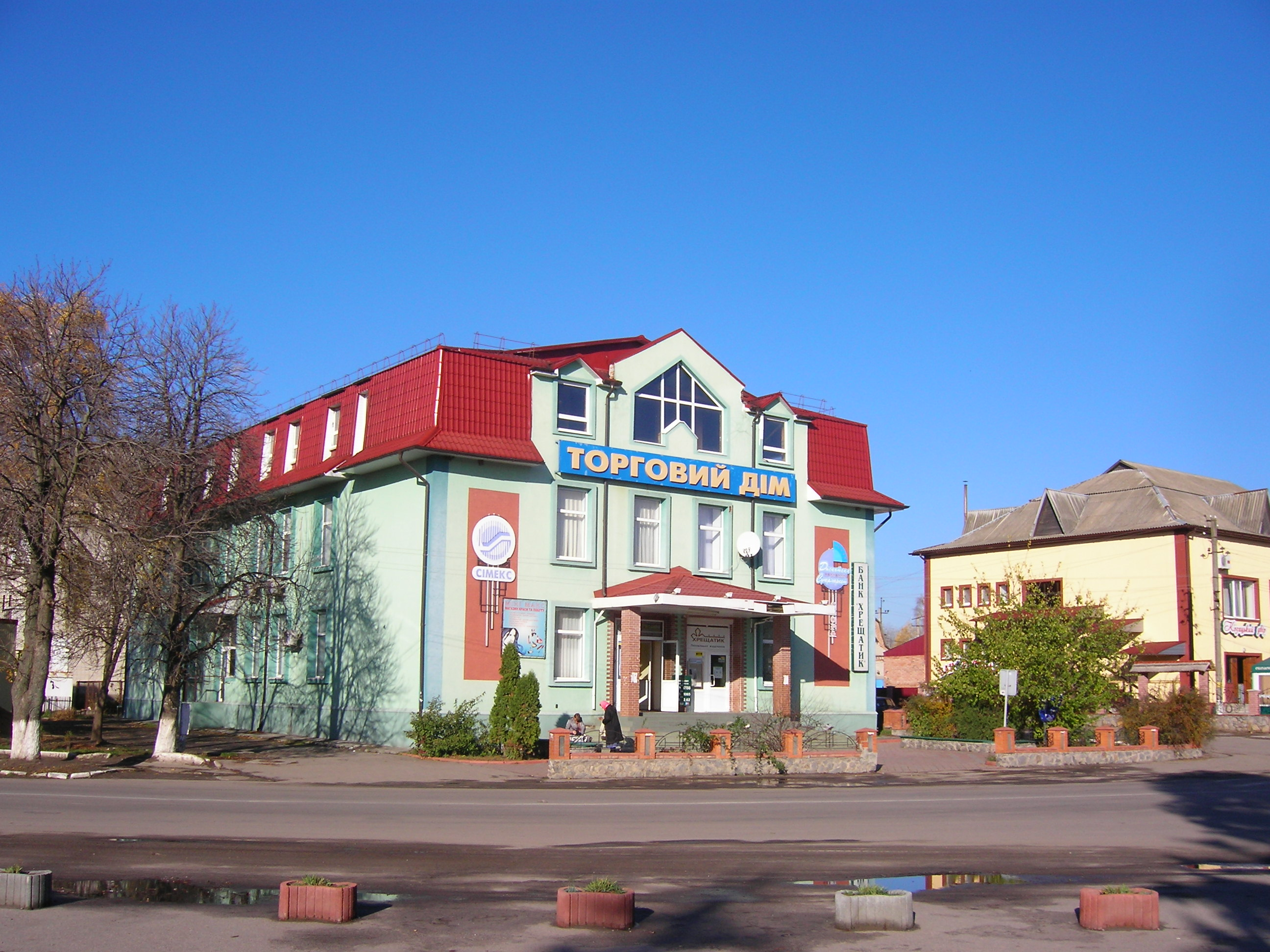 м. Липовець. Торговий дім